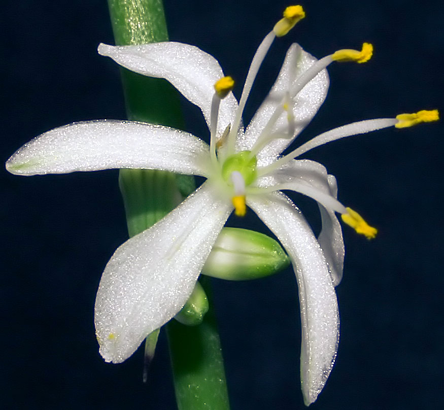 Geöffnete Blüte einer Grünlilie